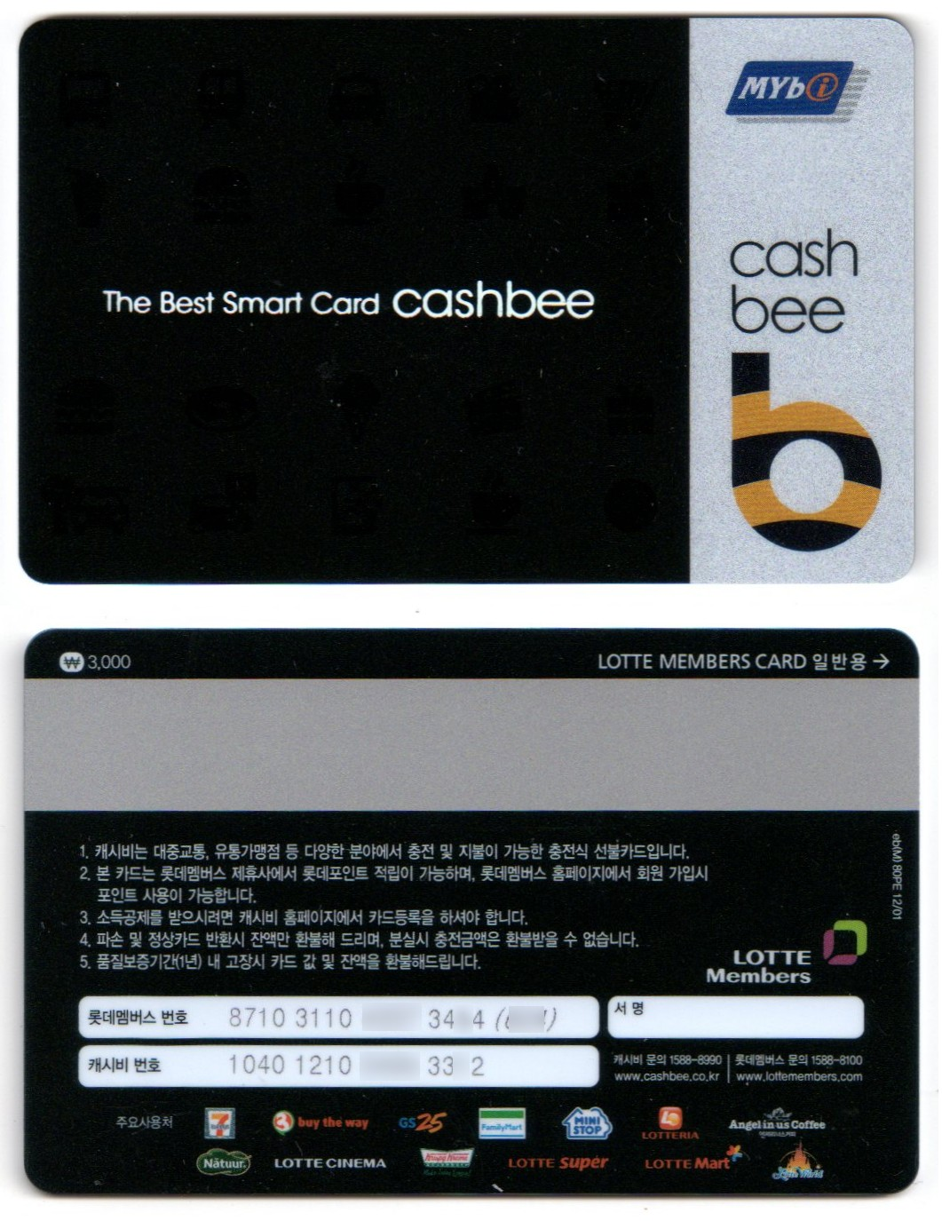 마이비 CI 가 있는 캐시비